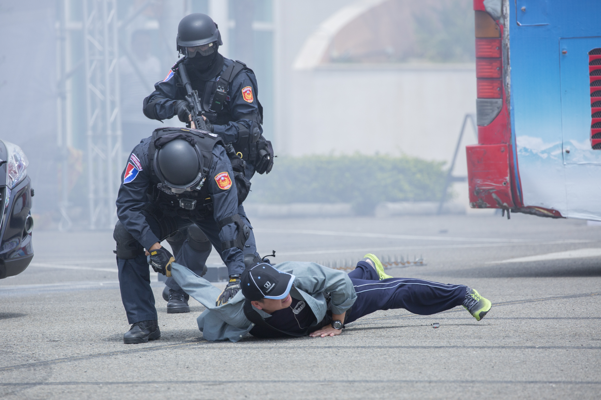 中文（台灣）: 「107年臺中市災害防救演習暨2018臺中世界花卉博覽會緊急應變演練」，臺中市政府警察局霹靂小組表演擒拿術。